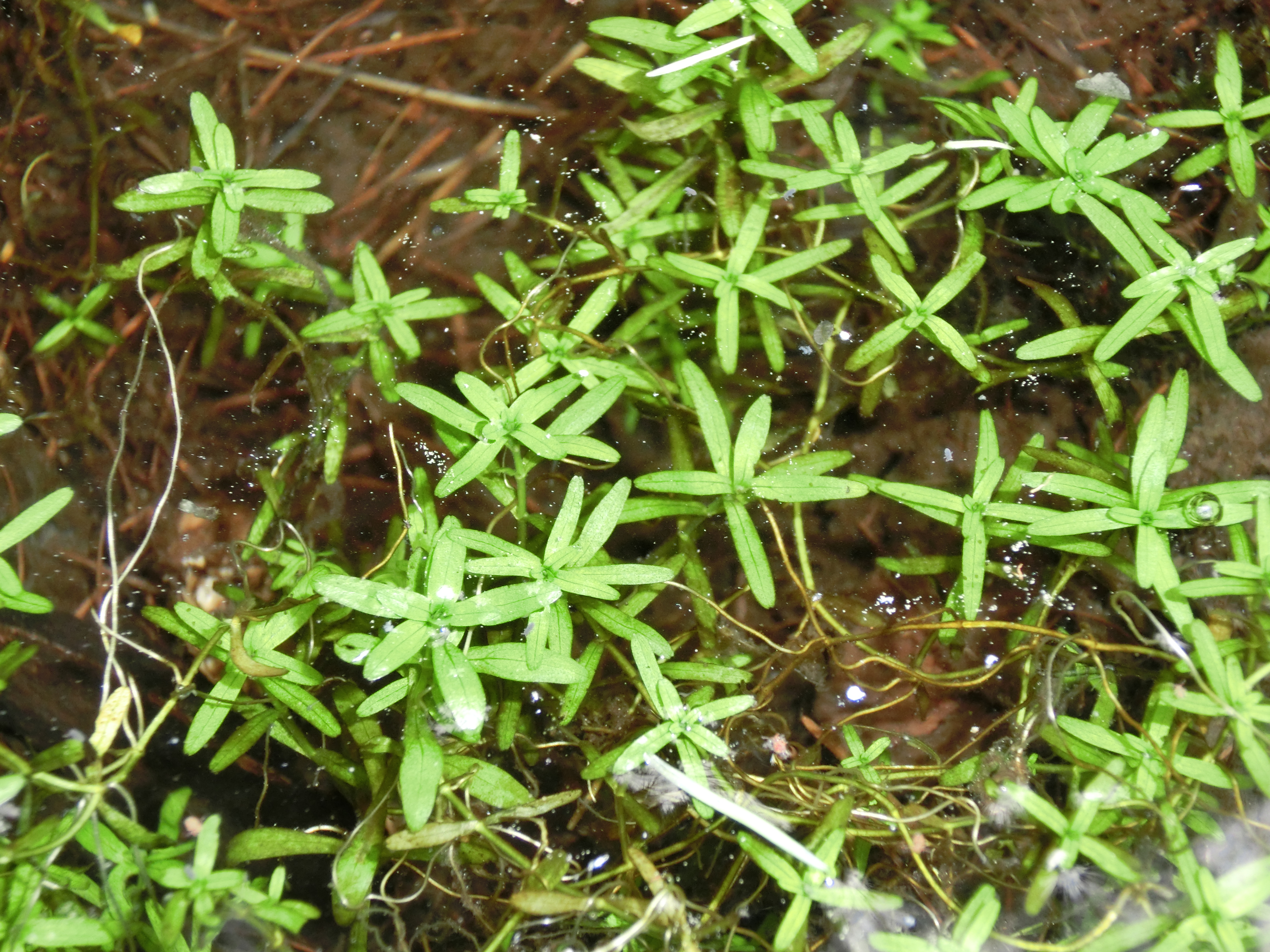 Callitriche à crochets